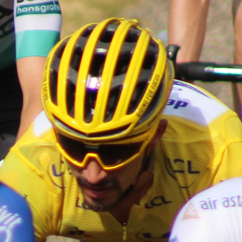 Julian Alaphilippe, le porteur du maillot jaune durant la 6e étape du Tour de France 2019.